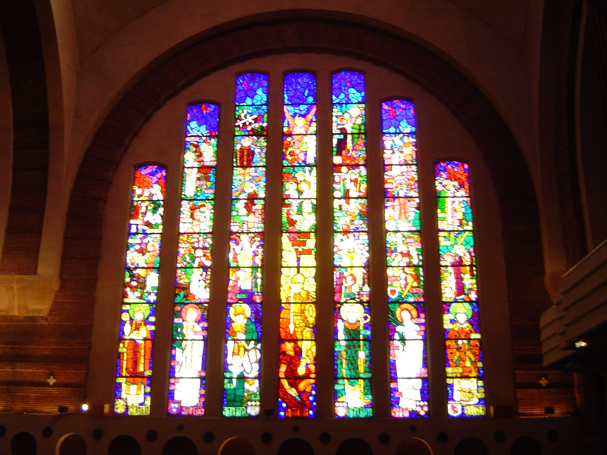 Photos prises à Paris